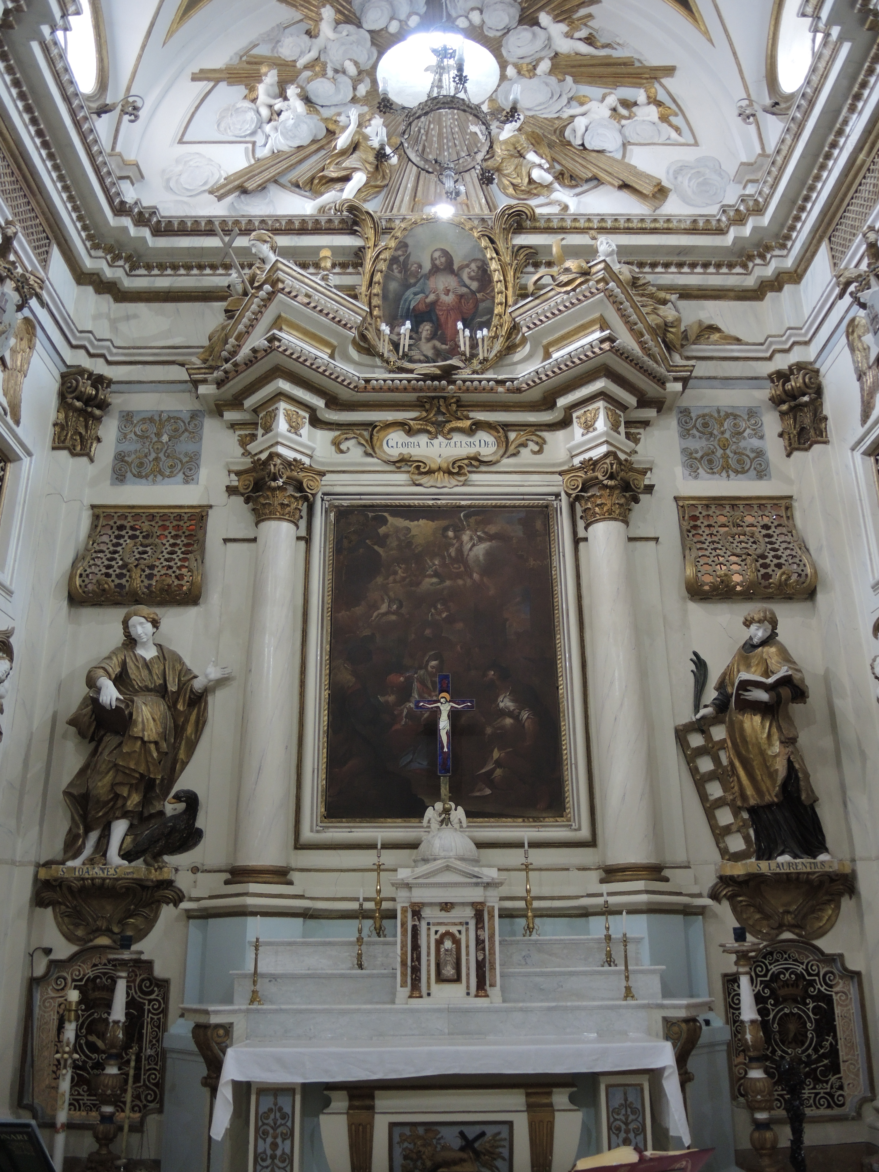 Penne: Chiesa di Santa Chiara